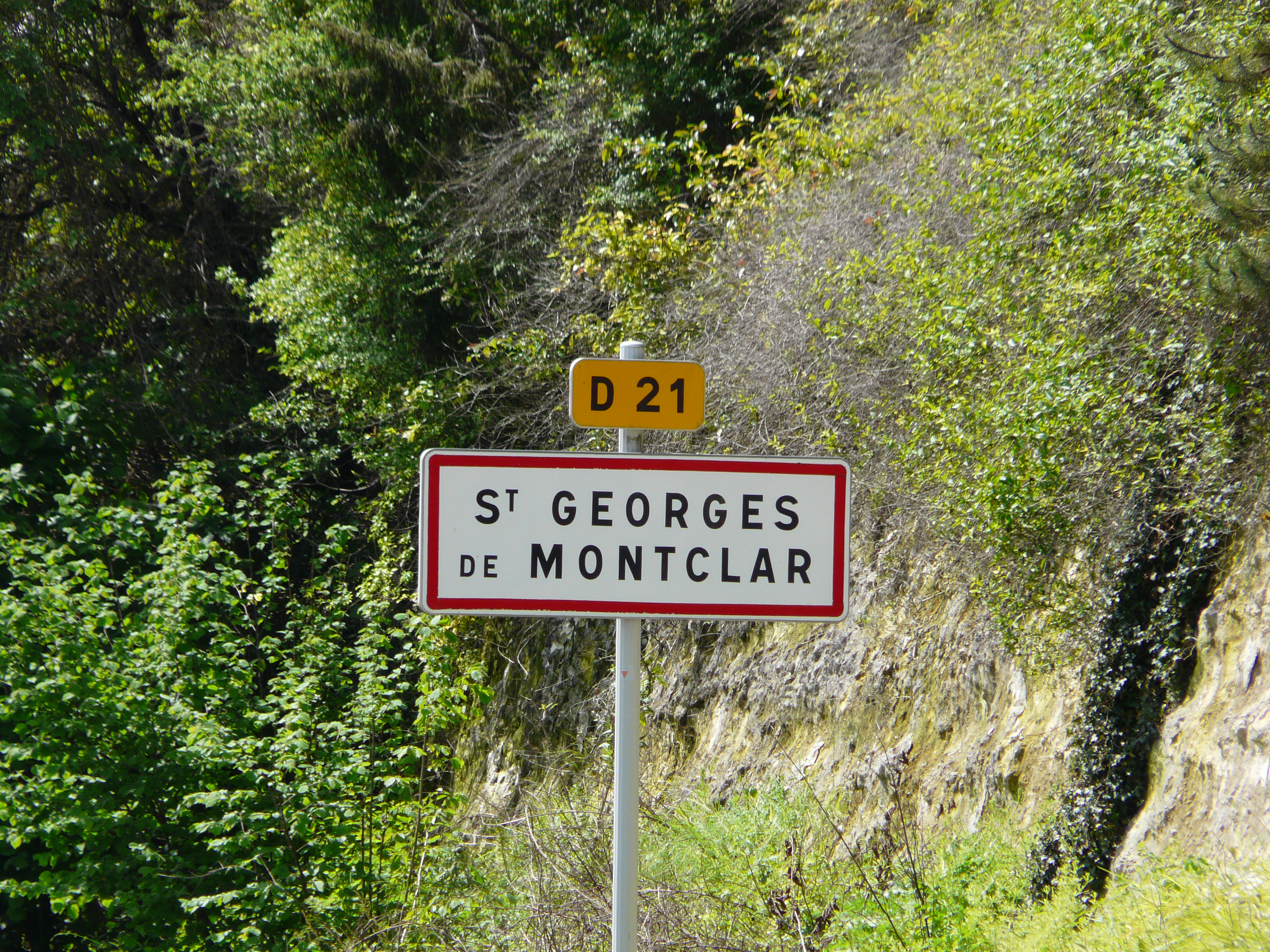 Panneau d'entrée à Saint-Georges-de-Montclard (avec orthographe différente), Dordogne, France.